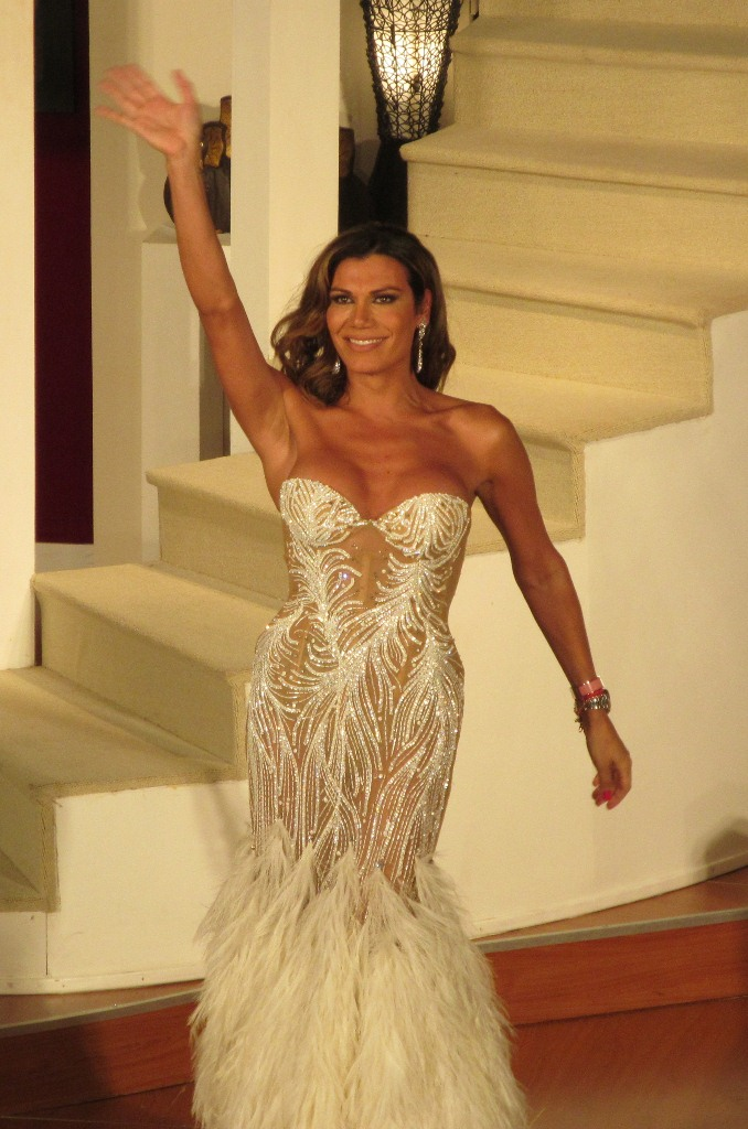 Florencia de la V saludando sobre el final de la obra "Que gauchita mi mucama" (enero de 2012).